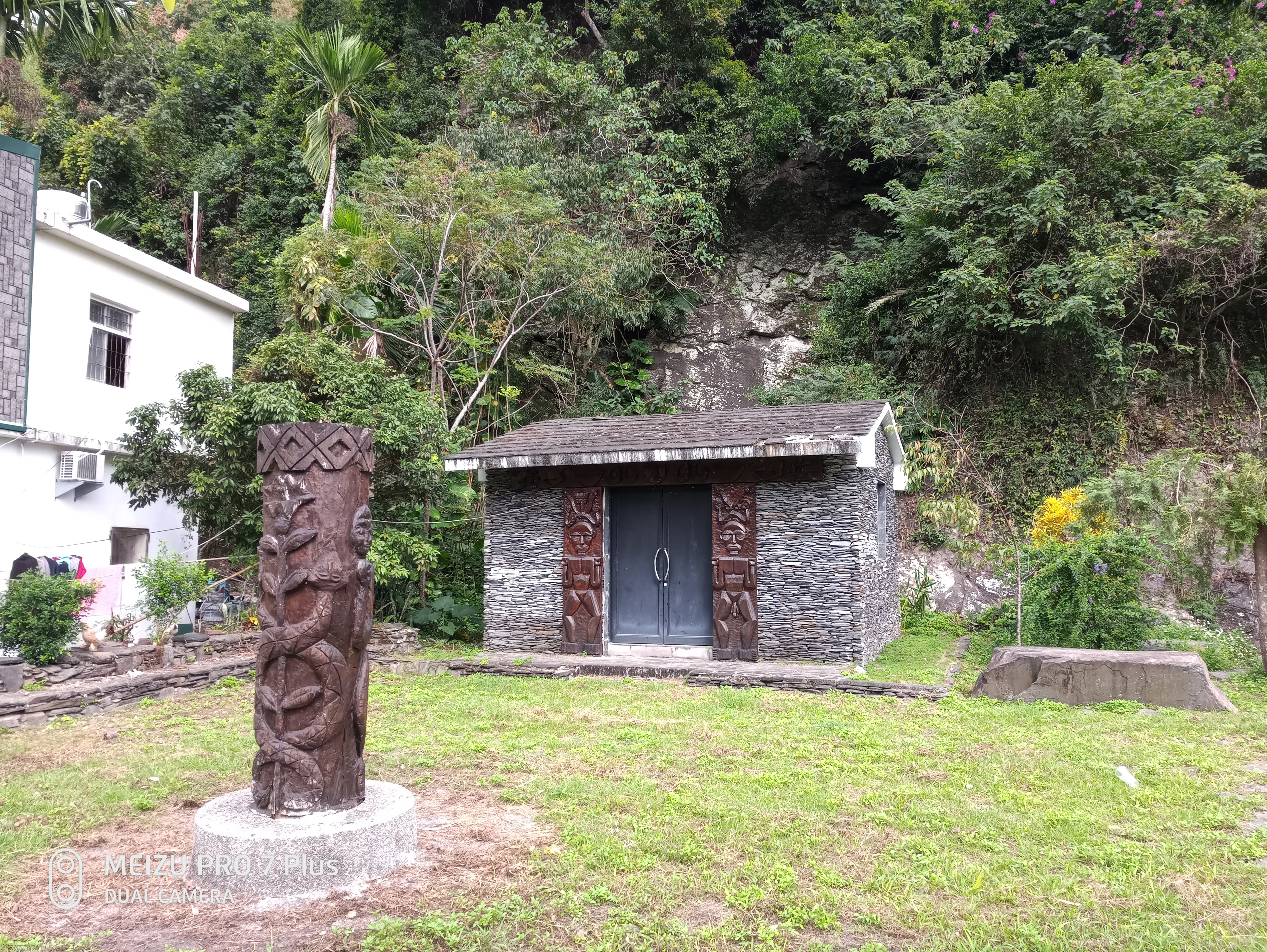 達魯瑪克部落祖靈屋